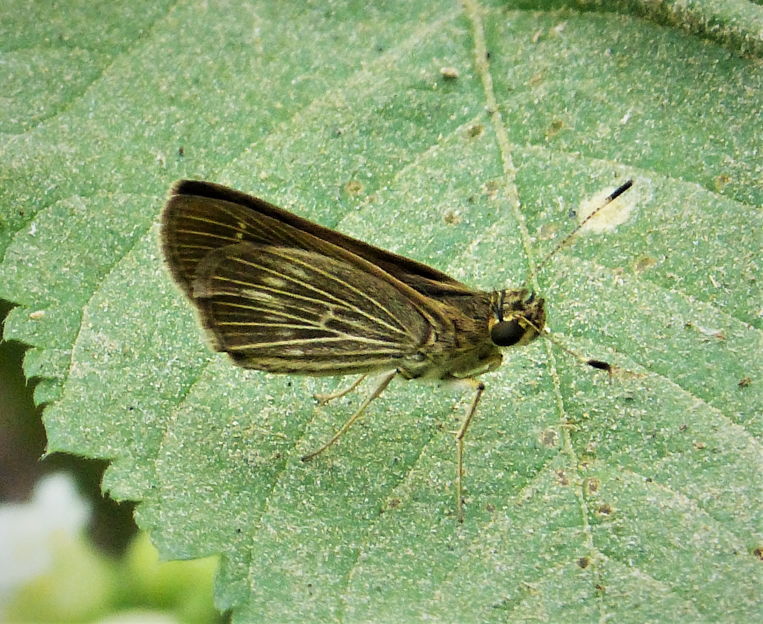 San Francisco reserve, nr Torti, Darien province, Panama